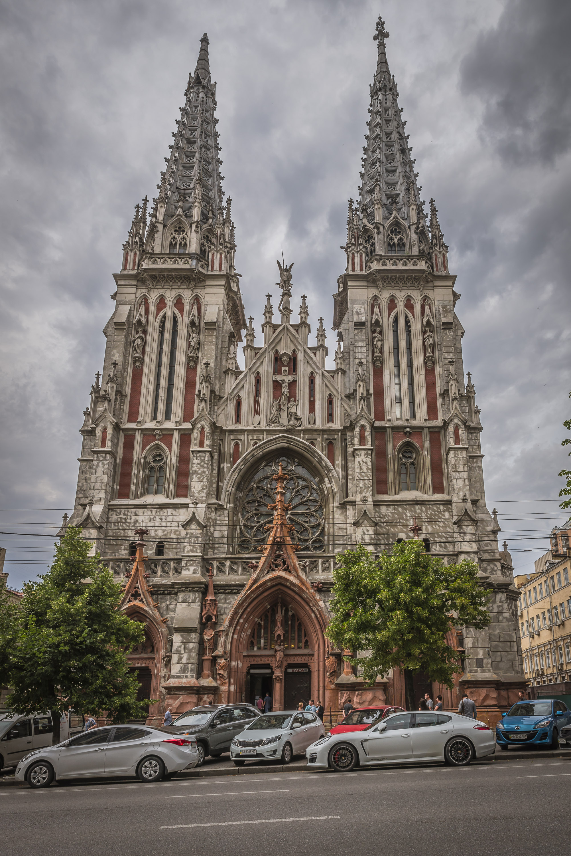 Костьол св. Миколая, Київ, Велика Васильківська вул., 77